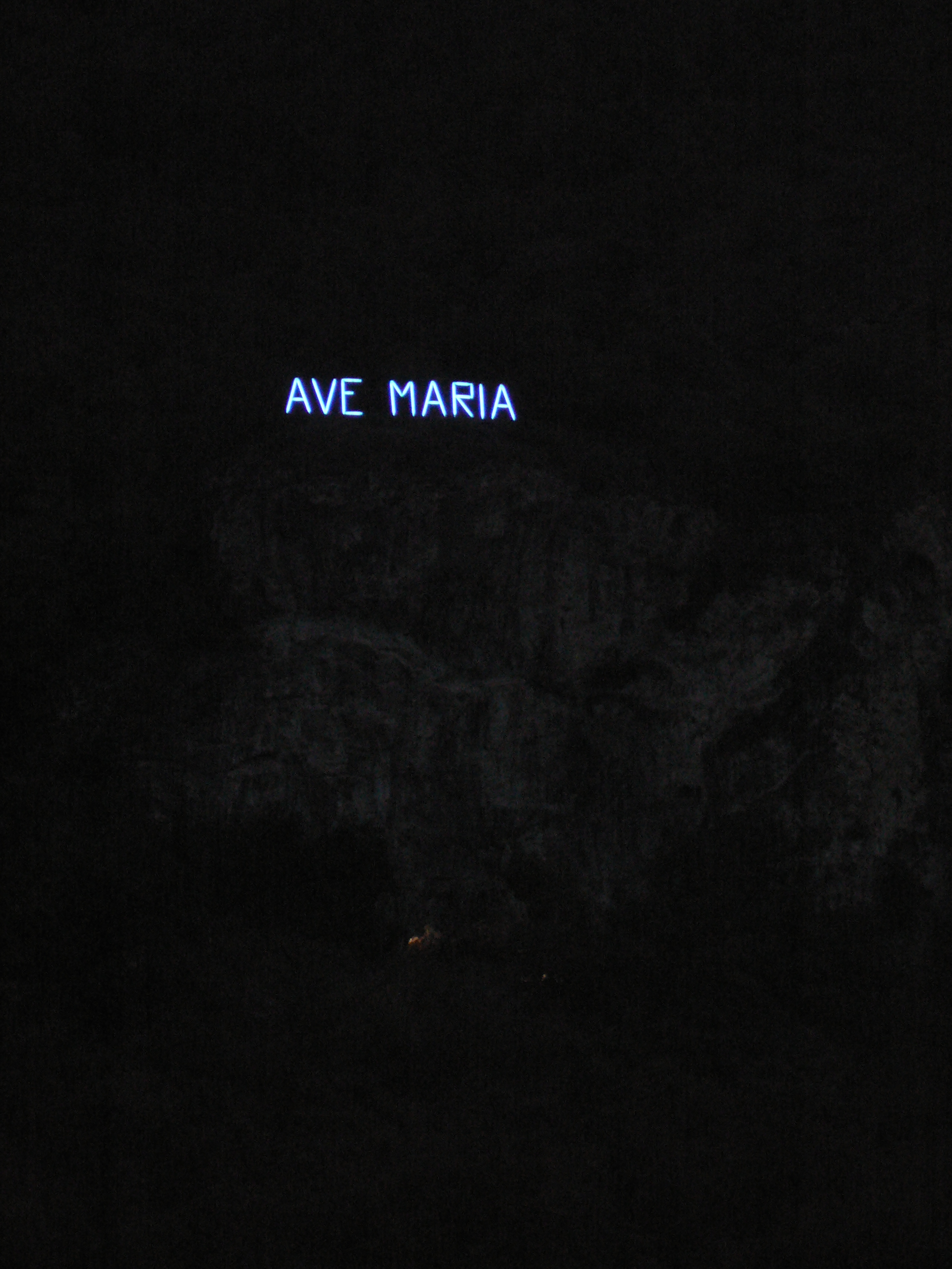 Grotta di Lourdes a Mezzocorona